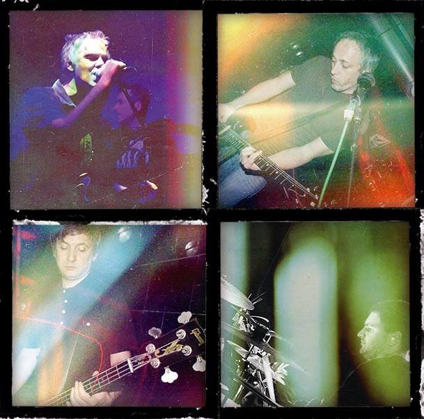 Foto de la banda de rock Iguana Lovers, actualidad